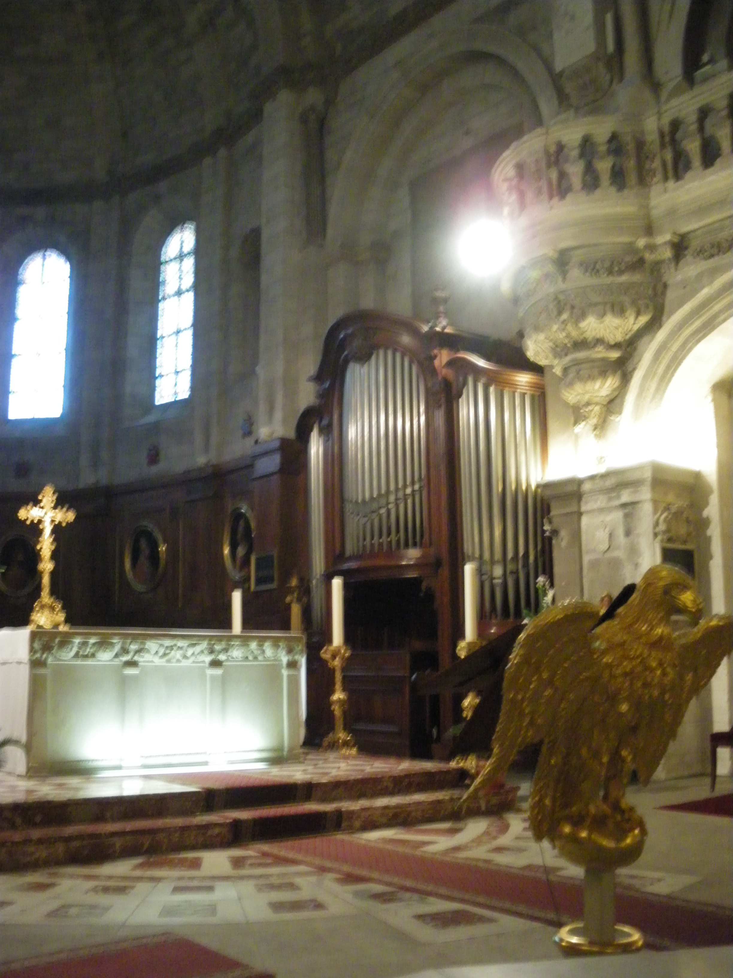 Intérieur Notre Dame des Doms, Avignon, Vaucluse